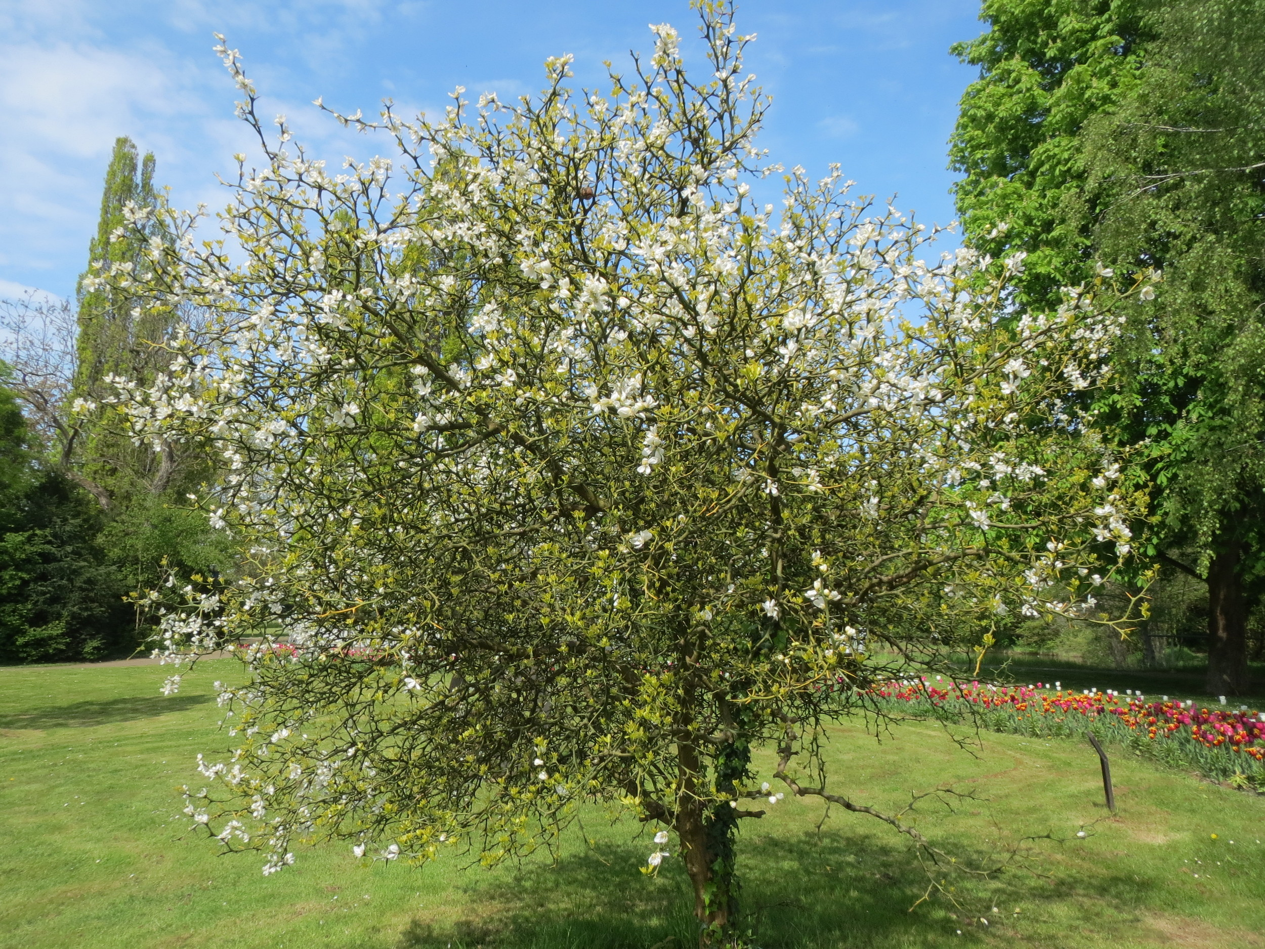 Dreiblättrige Orange (Citrus trifoliata) im Ebertpark Hockenheim